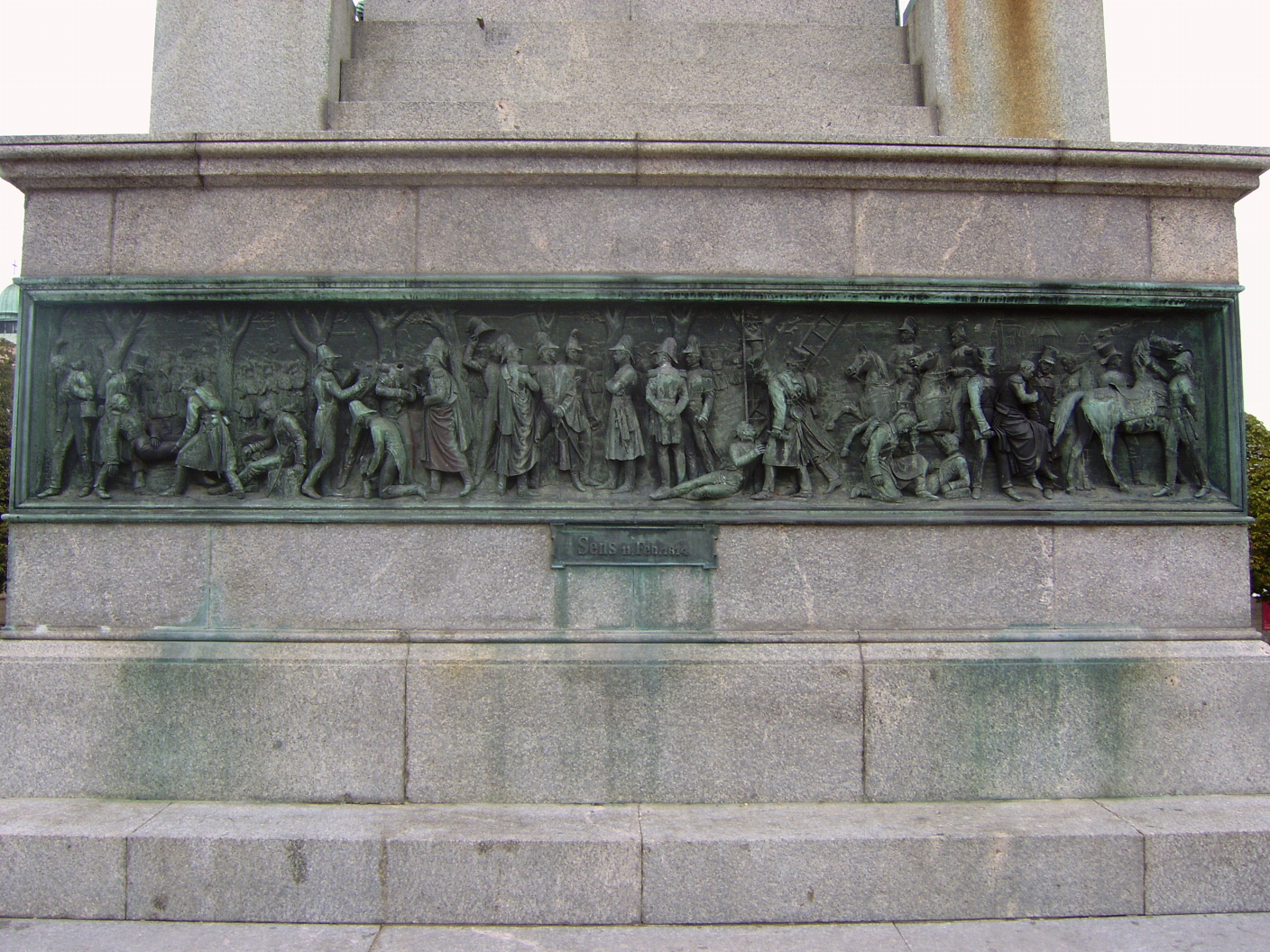 Stuttgart Mitte, Schloßplatz, Flst.Nr. 660/1, Jubiläumssäule, Theodor Wagner, 1860 – 1870; Seitenrelief "Die Erstürmung der Stadt Sens 11. Februar 1814"